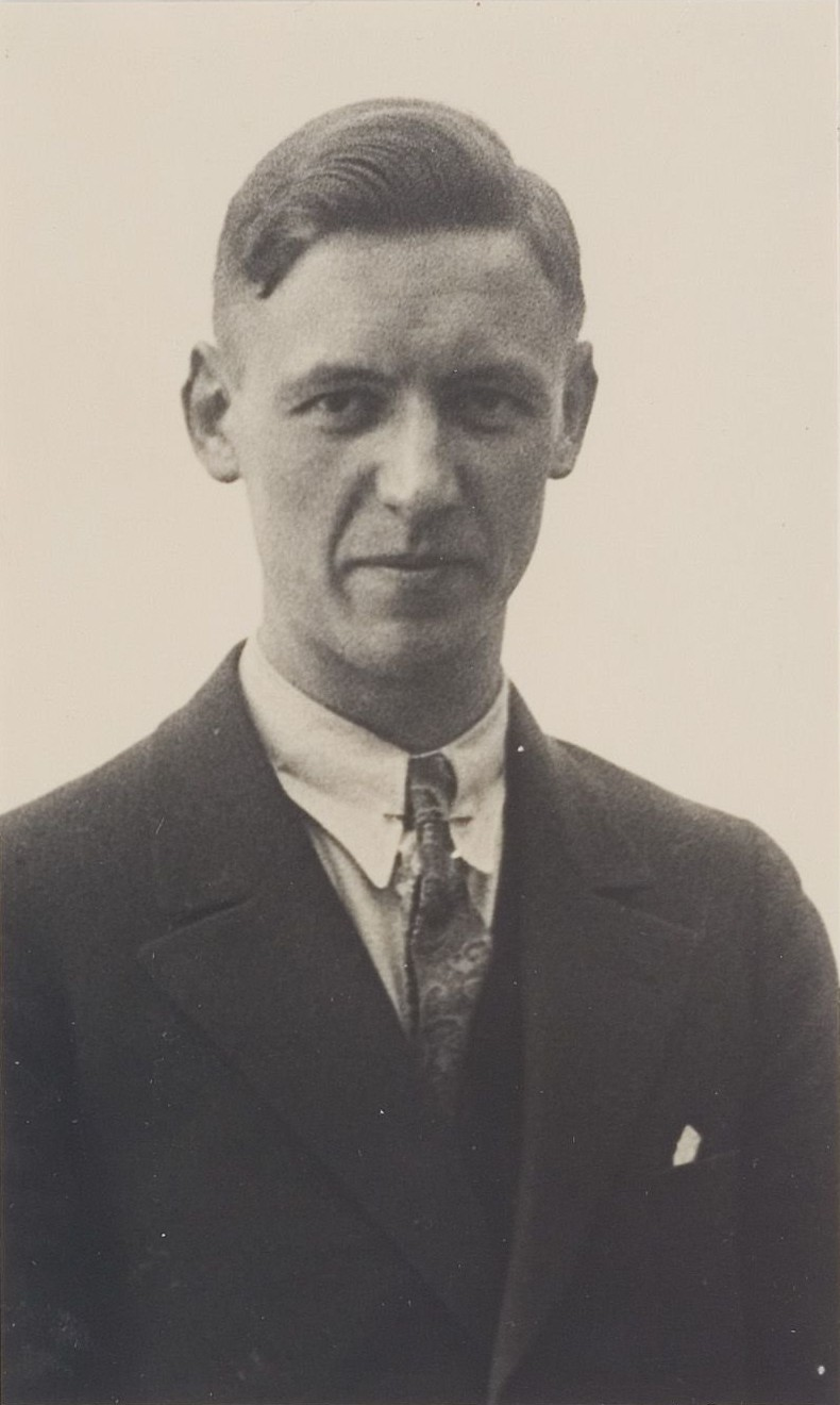 Portret van Henk Hos, verzetsstrijder gefusilleerd op 16 mei 1944.